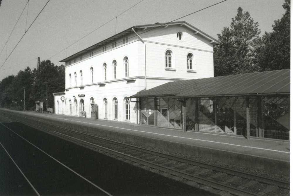 Der seit 1847 unveränderte Bahnhof Kamen der Köln-Mindener Eisenbahn-Gesellschaft, eigenes Bild, GNU FDL